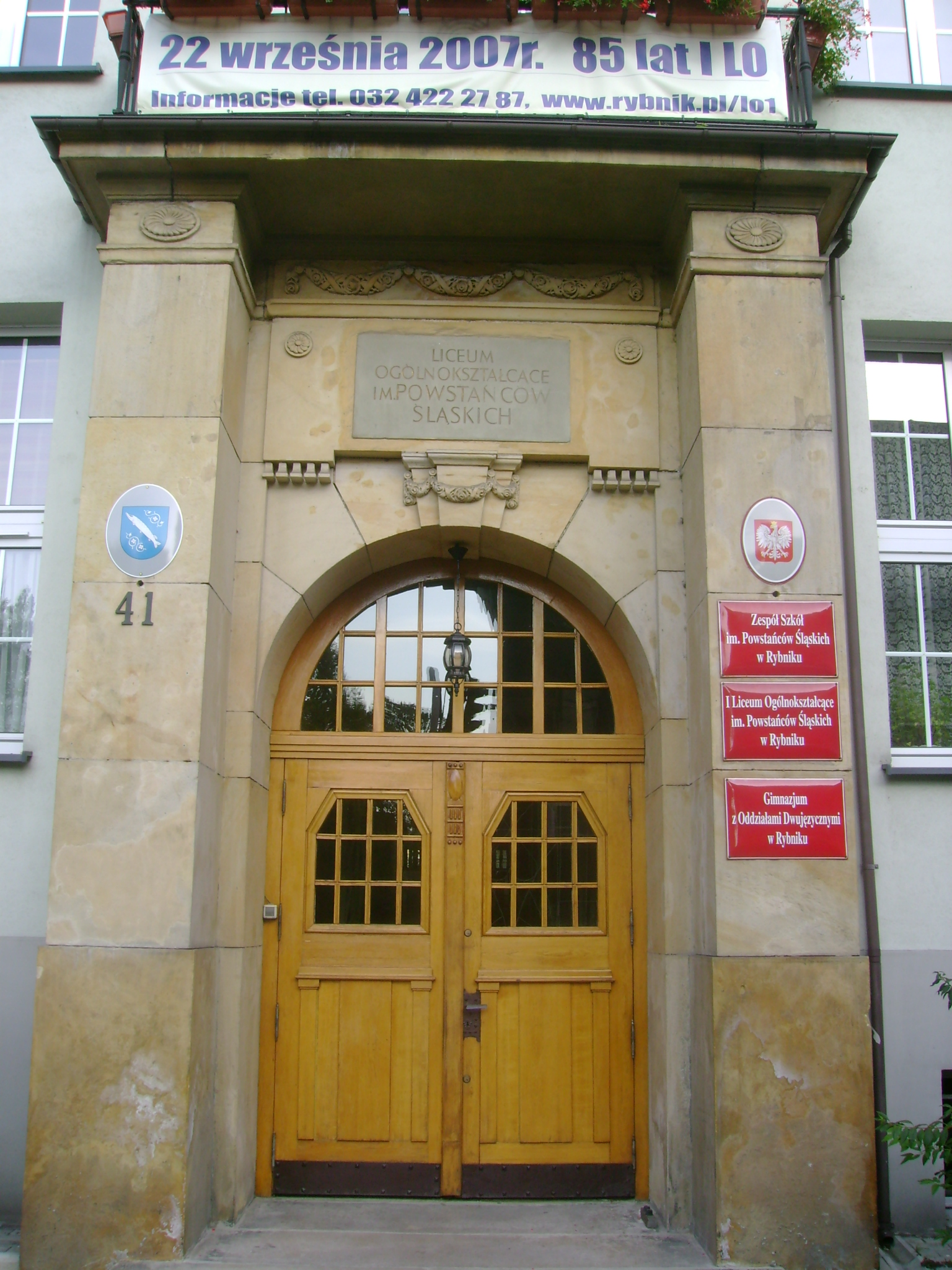 I LO Rybnik, gate